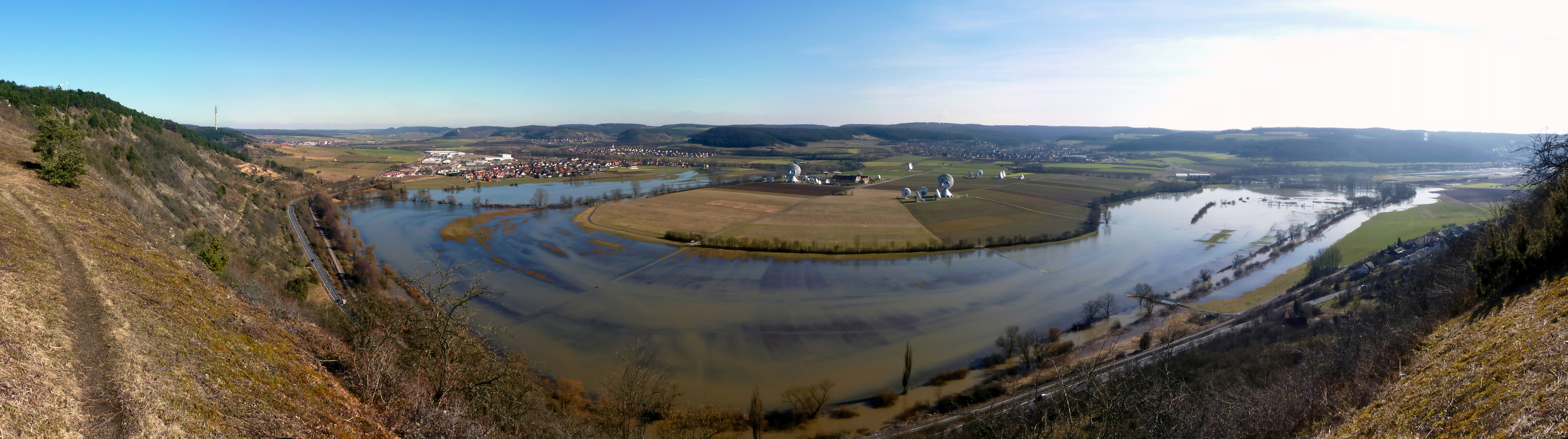 Panoramaansicht des Tales der Fränkischen Saale, mit der Erdfunkstelle Fuchsstadt. Diese gehört mit ihren etwa 50 Parabolantennen in vier Antennenfeldern zu einer der größten Satelliten-Kommunikationsanlagen der Welt, die derzeit vom US-amerikanischen Unternehmen Intelsat betrieben wird. Die größten Antennen haben Durchmesser von 32 Metern. Die Erdfunkstelle liegt auf einem ebenen Plateau, welches auf drei Seiten von der hochwasserführenden Fränkischen Saale umflossen wird. Am linken Bildrand der 137,5 Meter hohe Sendemast der Erdfunkstelle. Am Horizont die Wasserdampfwolke vom 25 Kilometer entfernten Kernkraftwerk Grafenrheinfeld.